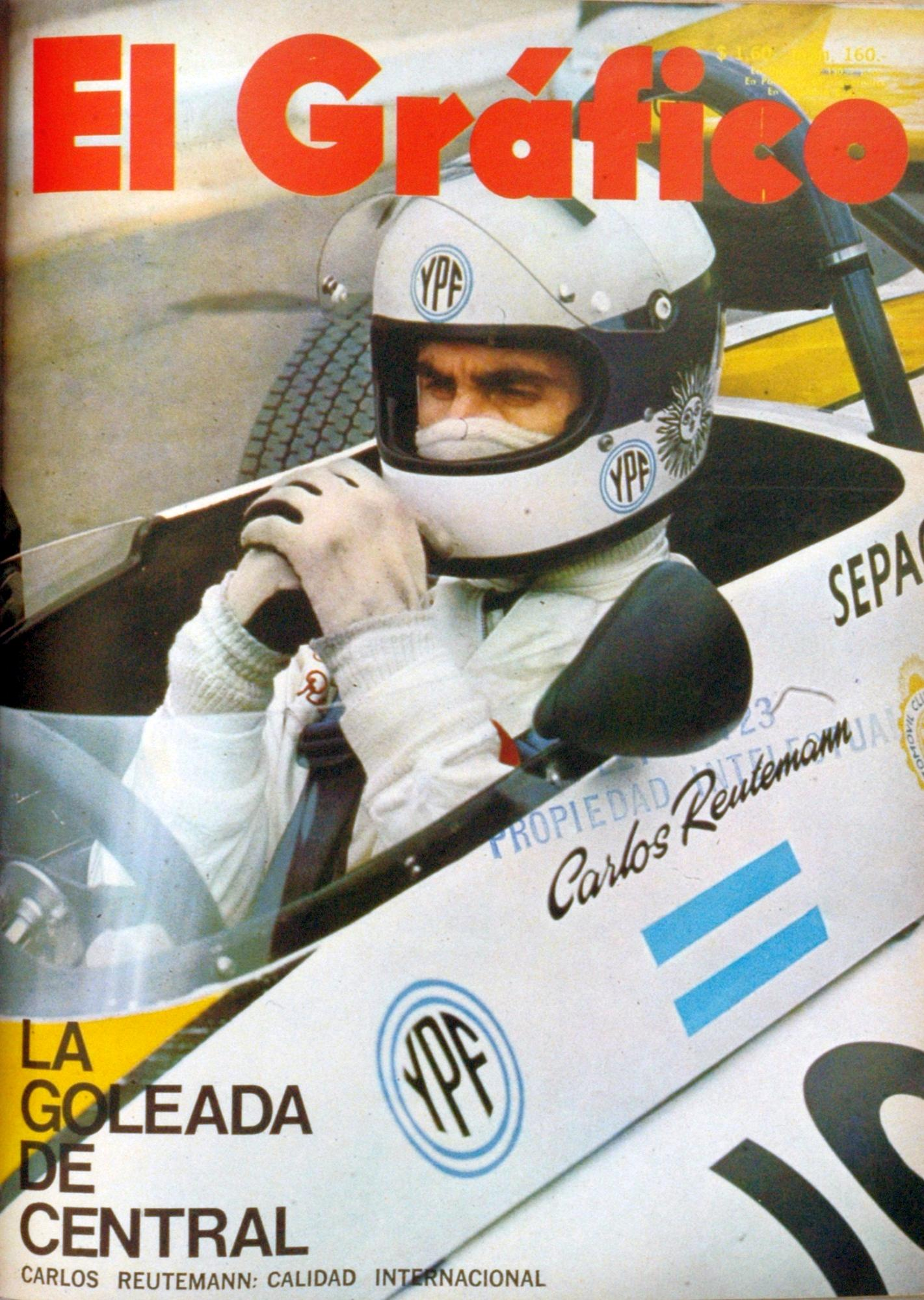 El Grafico del 23 de Noviembre de 1971. Edicion 2720